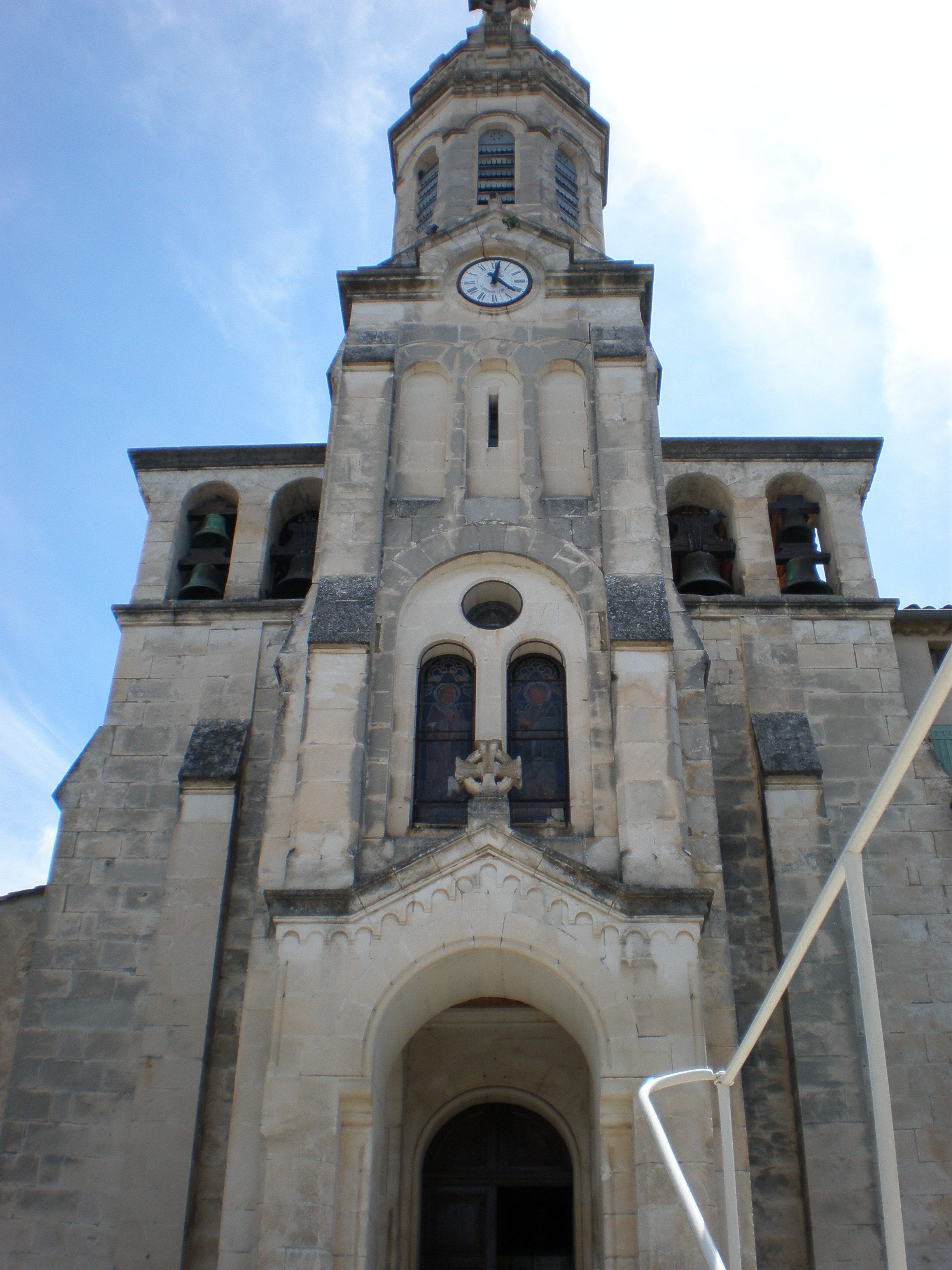 Eglise Saint-Félix de Boisson, commune d'Allègre-les-Fumades (gard)